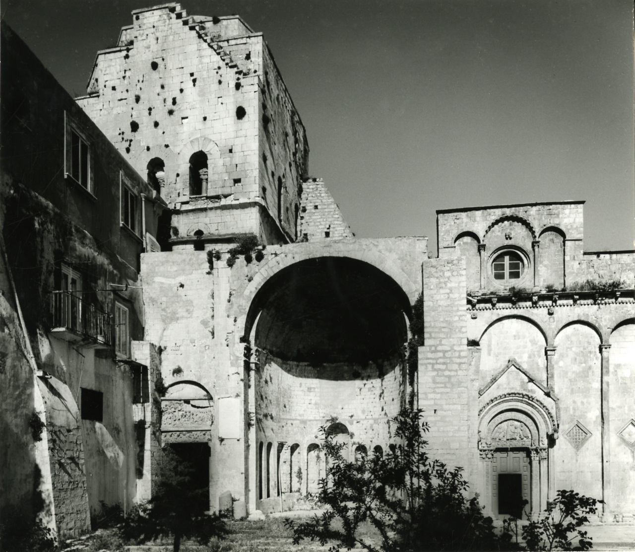 Serie fotografica : Monte Sant'Angelo, 1965 / Paolo Monti. - Stampe: 2 : Positivo b/n, gelatina bromuro d'argento/ carta, 24x30. - ((Al verso delle stampe manoscritto numero di negativo corrispondente: 11441-11442. Al verso delle stampe manoscritto: "Monte Sant'Angelo Tomba di Rotari". Sul coperchio della scatola manoscritto a pennarello nero: "Puglie/ Architettura". - Occasione: Primo viaggio per volume Puglia di Electa. - Fonte: Agenda di Paolo Monti: Monti - Agenda 1970 (1970), presso Archivio Paolo Monti